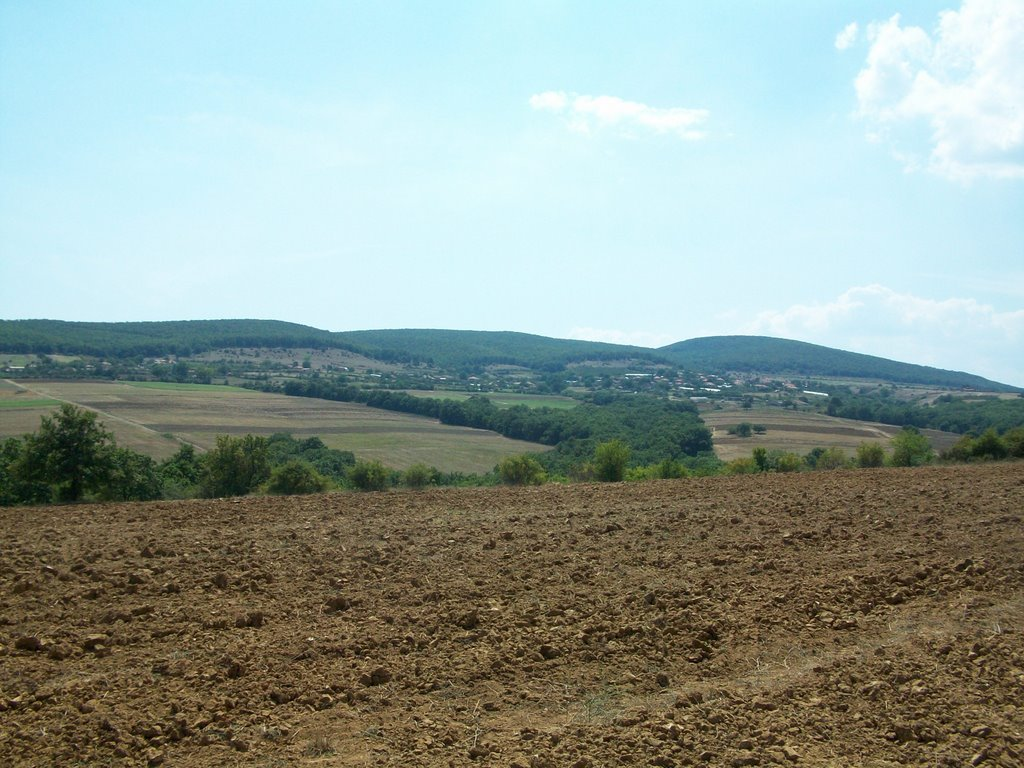 Черна могила през юли 2009